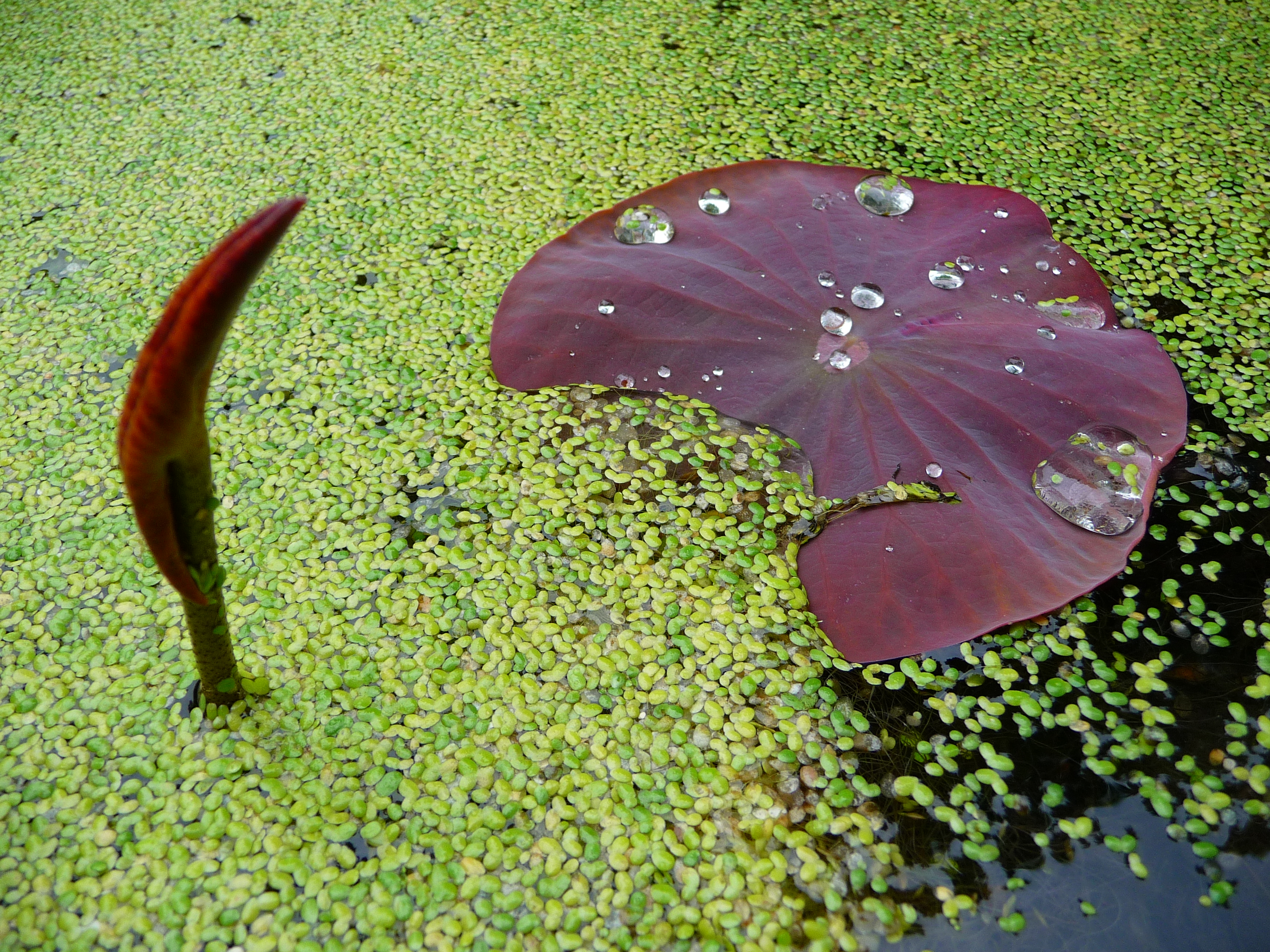 Lotusblatt (Nelumbo) in einem Becken mit (Lemna minor L.), fotografiert in Heidelberg (Baden-Württemberg, Deutschland)